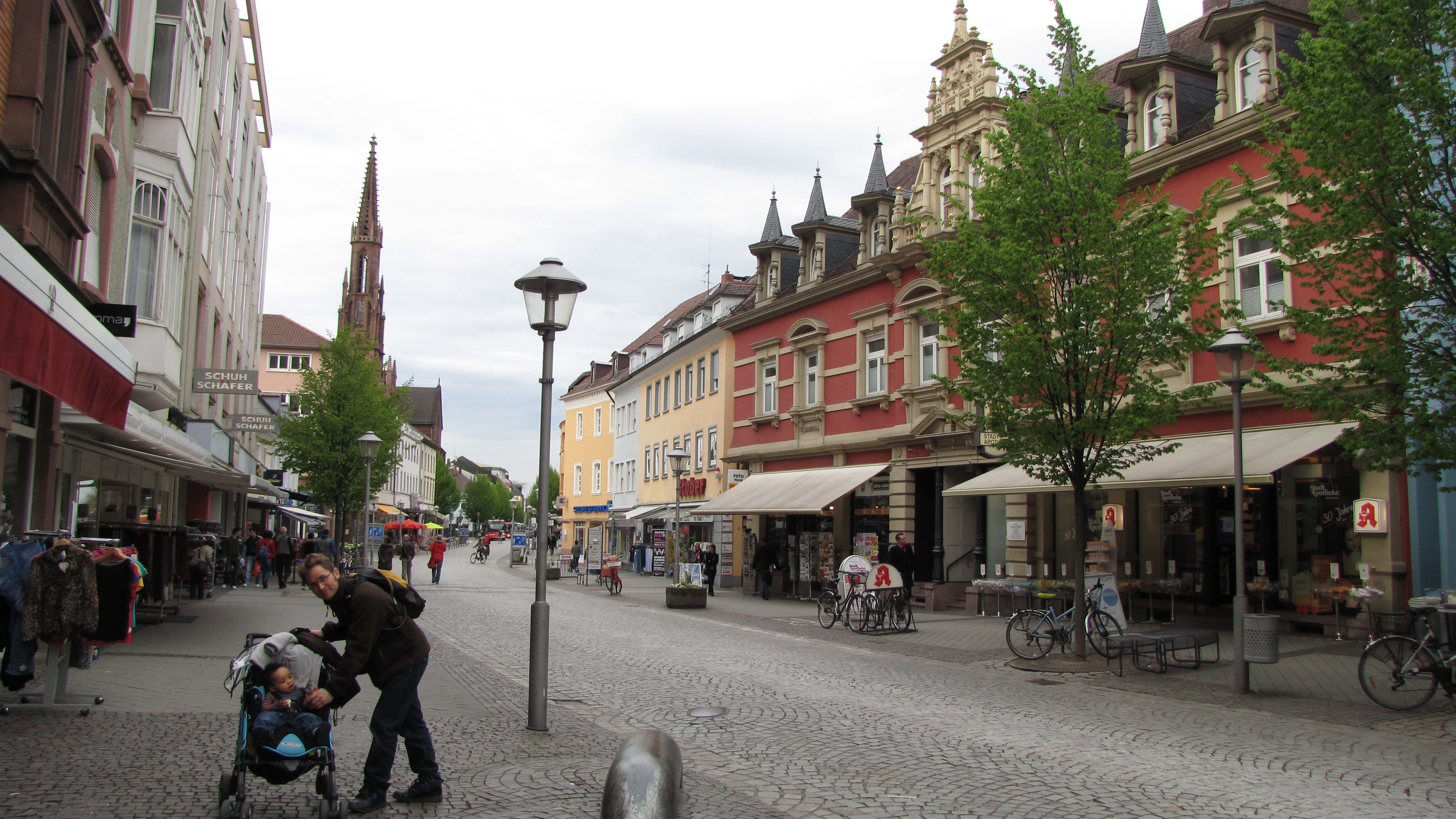 Le centre-ville d'Offenbourg (Bade-Wurtemberg, Allemagne) avec la vue de l'église Stadtkirche.